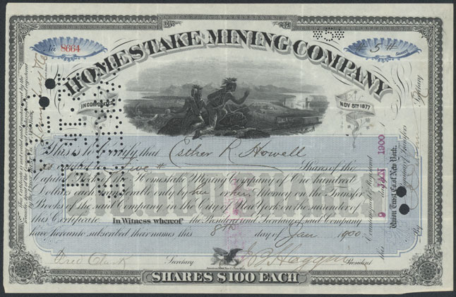 Aktie der Homestake Mining Company vom 8. Januar 1900